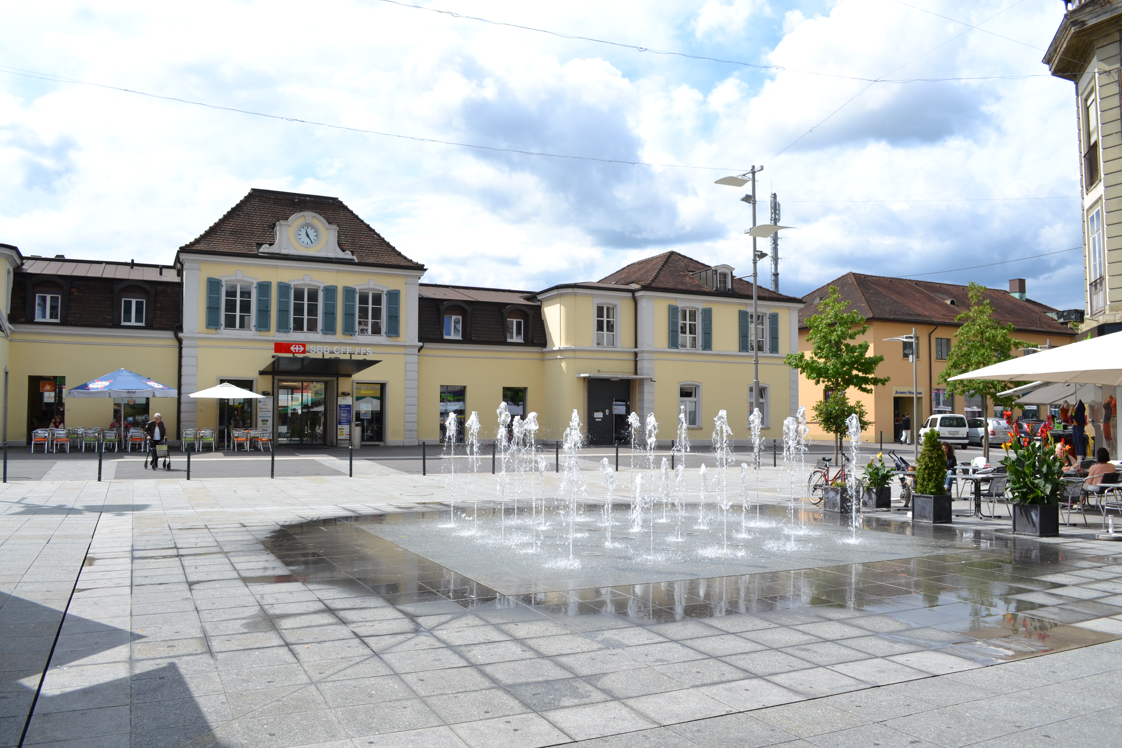 Gare CFF de Delémont et Fontaine de l'Europe